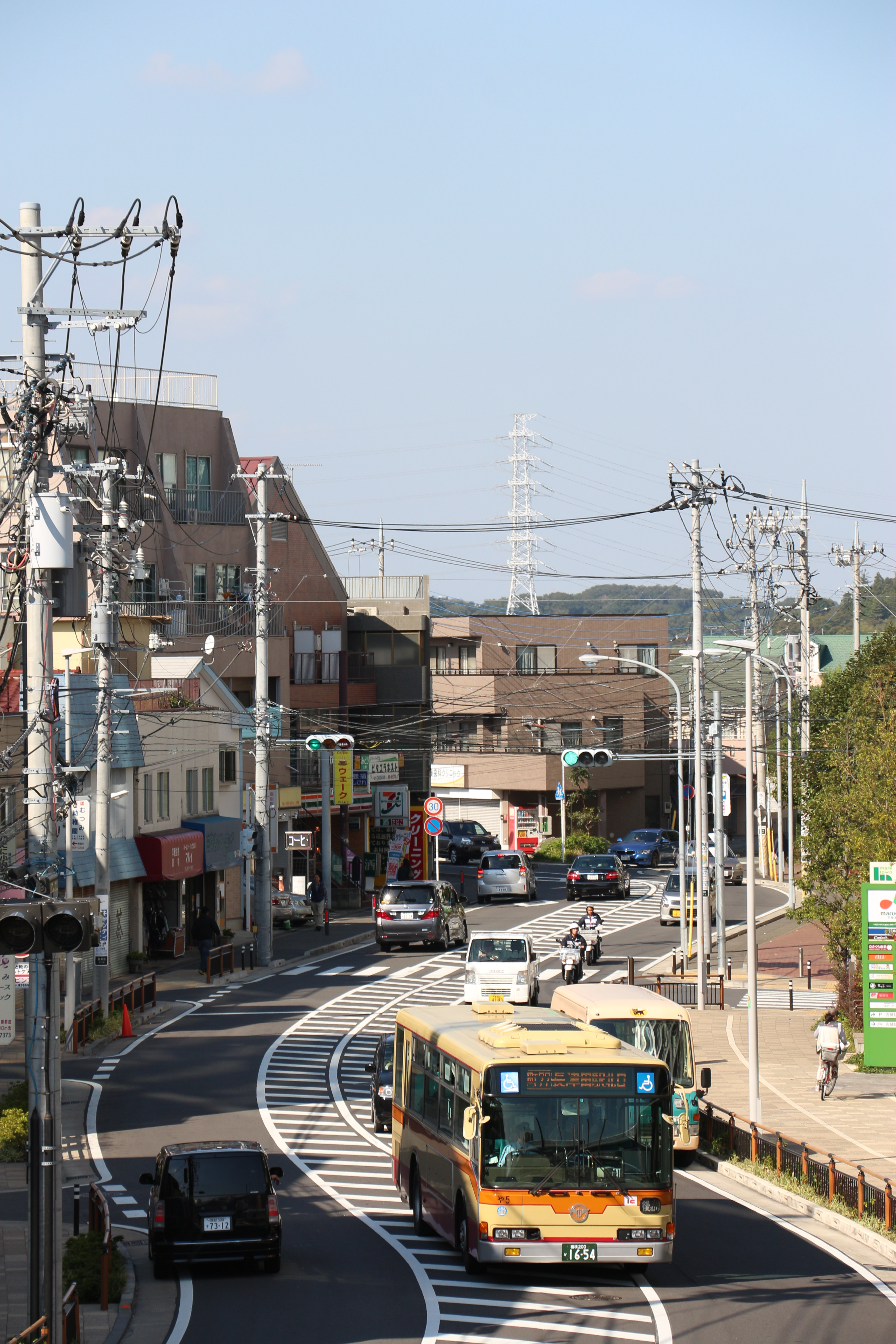 2014年9月より新設された長津田駅北口発着の系統。 それに合わせ、道路も改修されました。